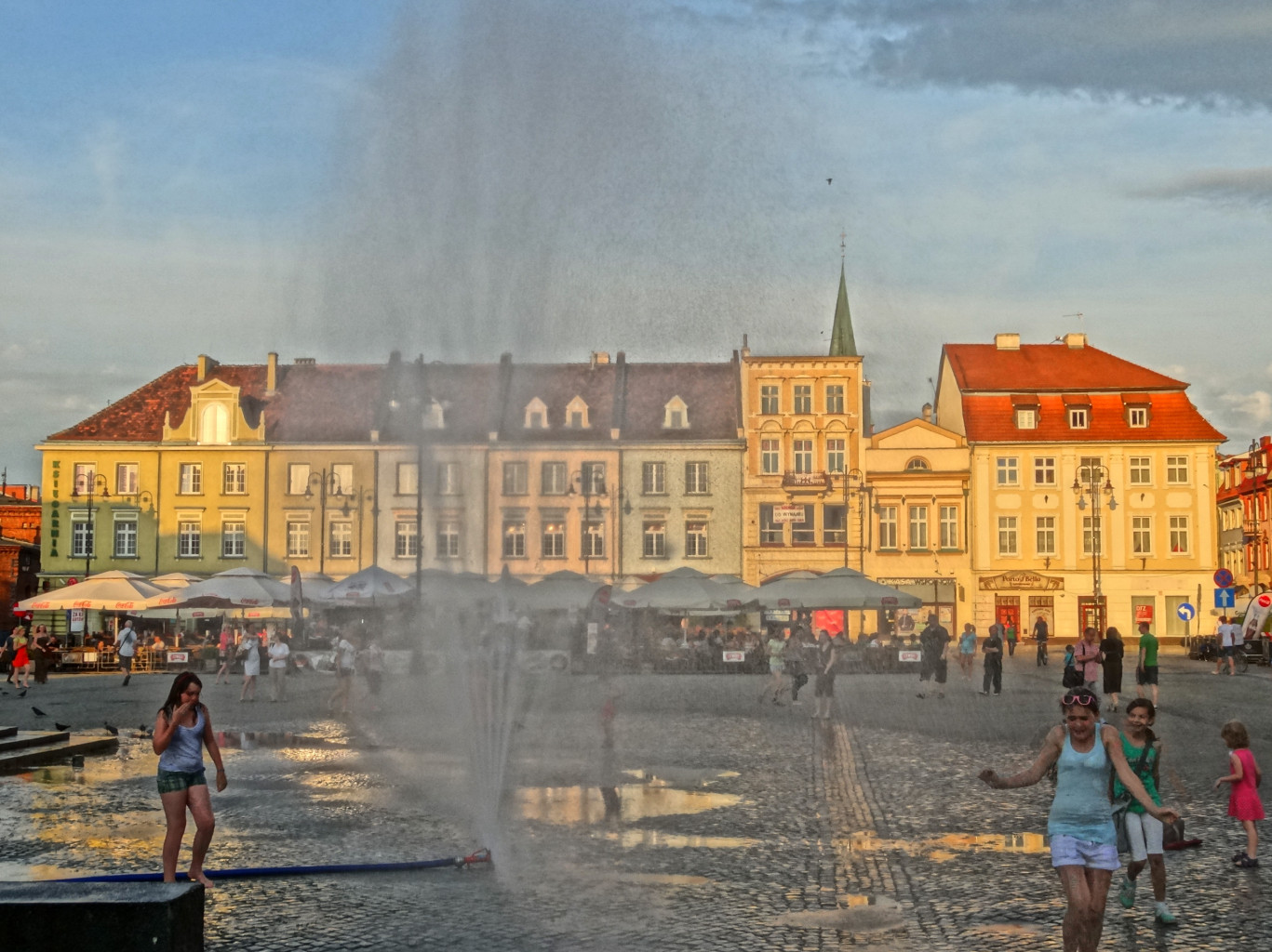 Wschodnia pierzeja Starego Rynku w Bydgoszczy